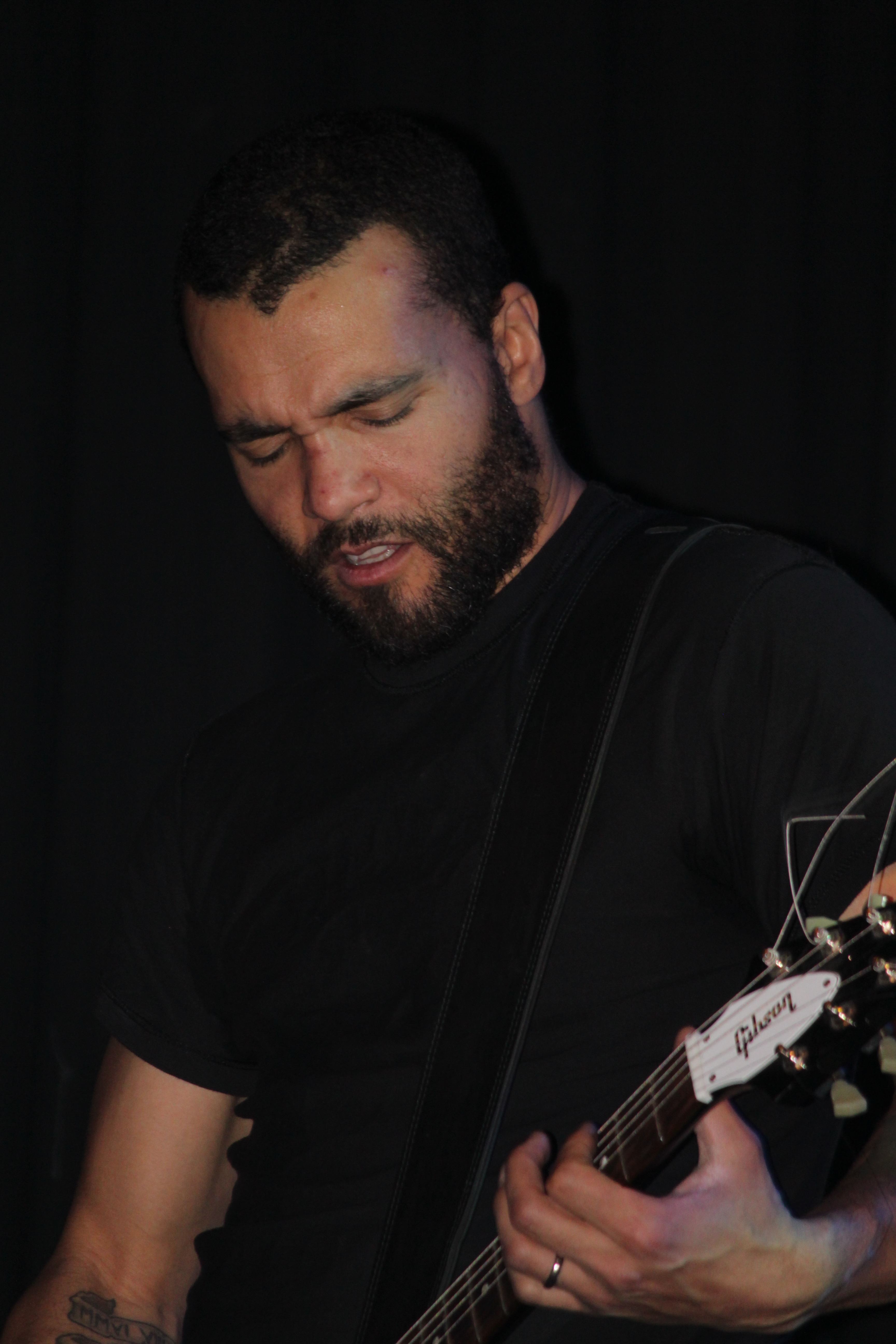 Alex Hellid i Entombed, på Cozmoz, Borlänge, Sverige.